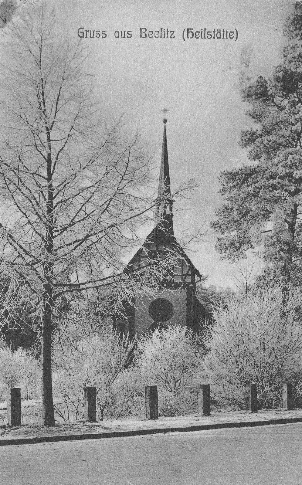 alte Kirche von Beelitz-Heilstätten